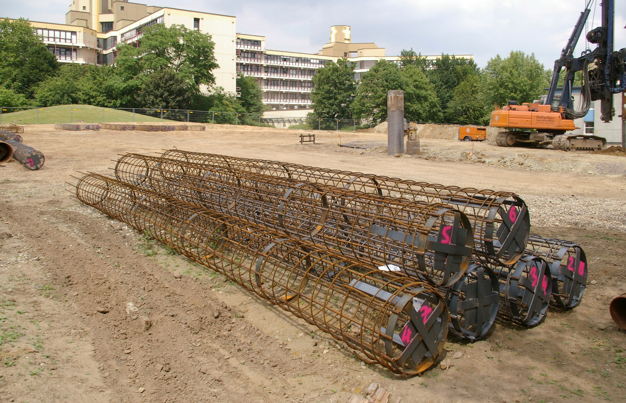 Vorgefertigte Armierungen für eine Tiefgründung mit Großbohrpfählen